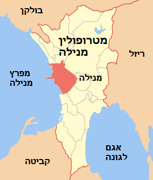 תירגמתי מאנגלית